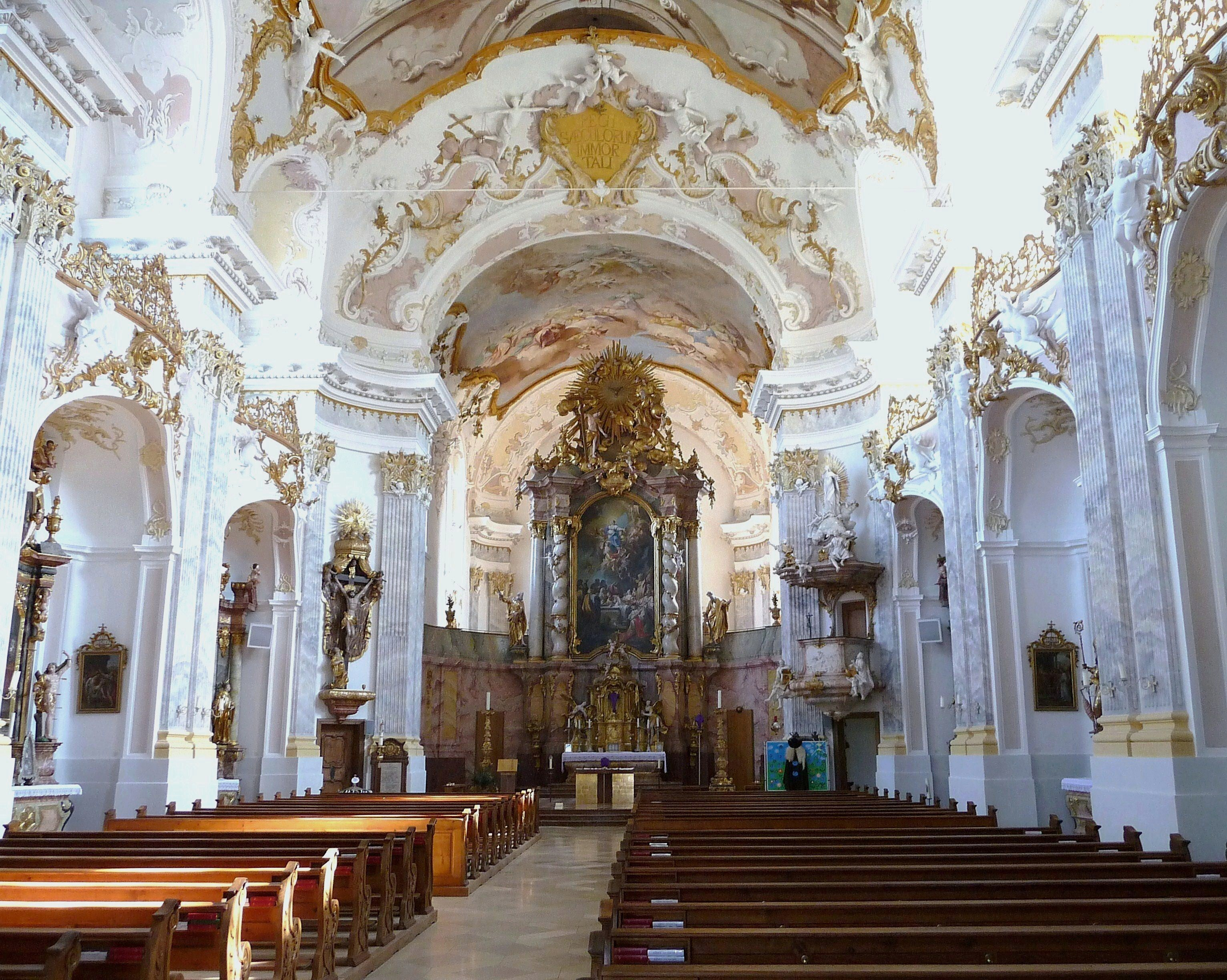 Innenansicht der Pfarr- und ehemaligen Abteikirche Maria Himmelfahrt in Fürstenzell